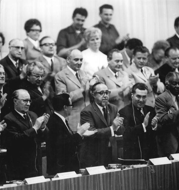 ADN-ZB Kollektiv 16-6-71-ba Berlin: VIII. Parteitag der SED- Mit langanhaltendem Applaus danken die Delegierten und Gäste dem Mitglied des Sekretariats des ZK der KP Kubas Carlos Rafael Rodriguez (3.v.l.) für seine heutige (16.6.) Grußansprache an den Parteitag; v.l.n.r. János Kádár, Erster Sekretär des ZK der USAP, Nguyen Van Hieu, Mitglied des Präsidiums des ZK der Nationalen Befreiungsfront Südvietnams, Carlos Rafael Rodriguez, Paul Niculescu-Mizil, Mitglied des Ständigen Präsidiums des Exekutivkomitees und Sekretär des ZK der RKP. (Rep.: Junge) (VIII-C)